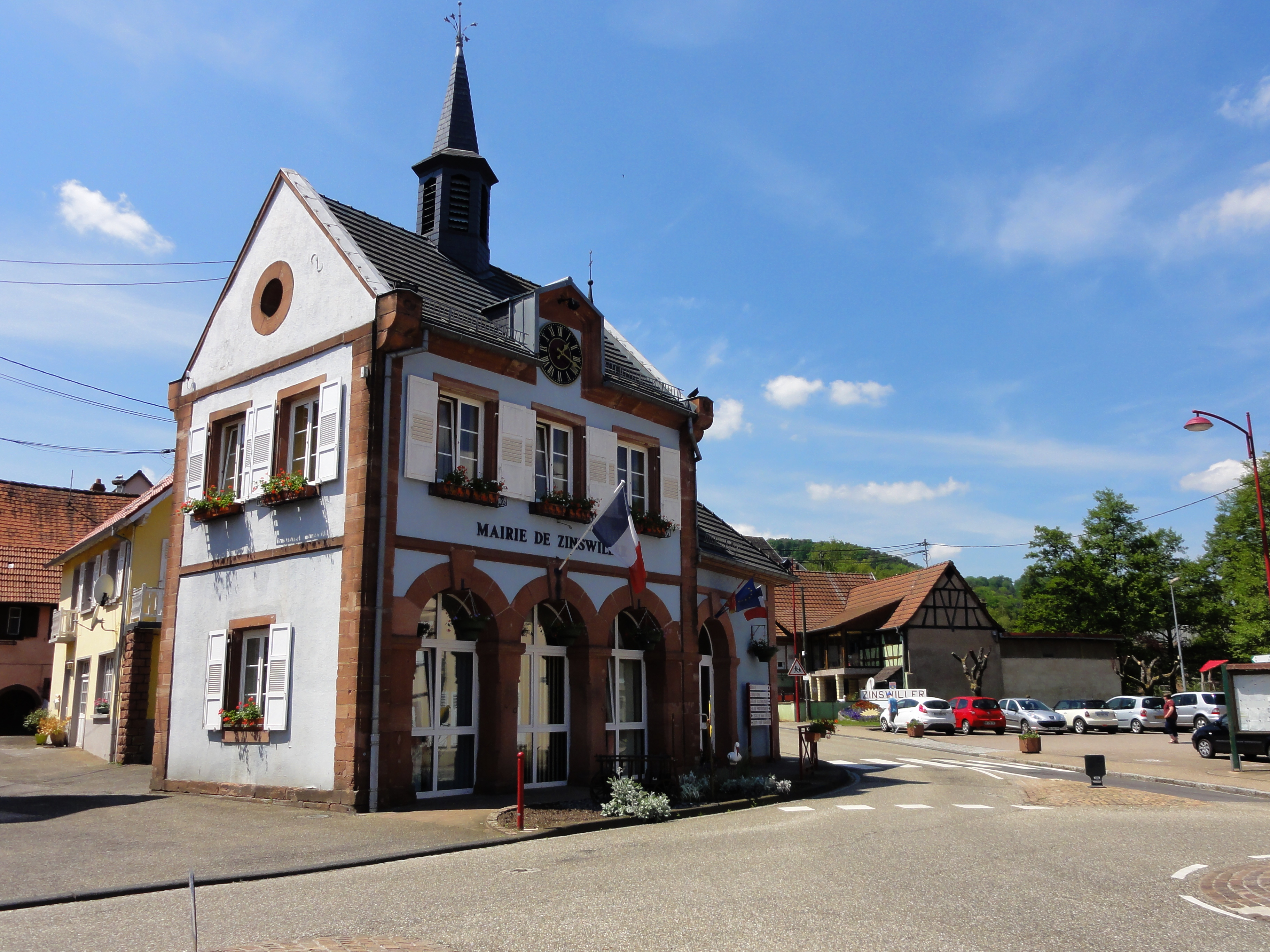 Alsace, Bas-Rhin, Zinswiller, Mairie (XIXe), 2 rue d'Uhrwiller.